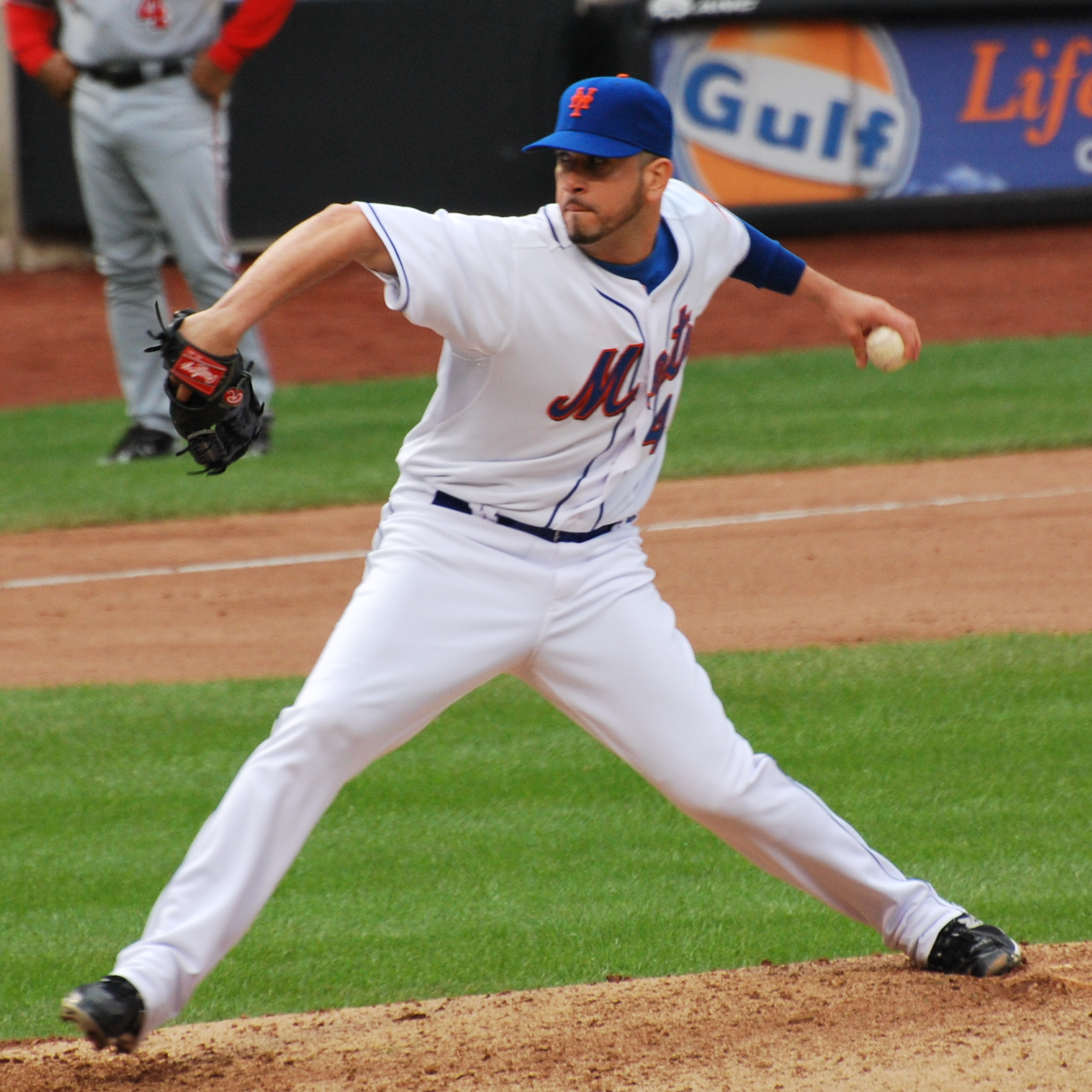 Óliver Pérez